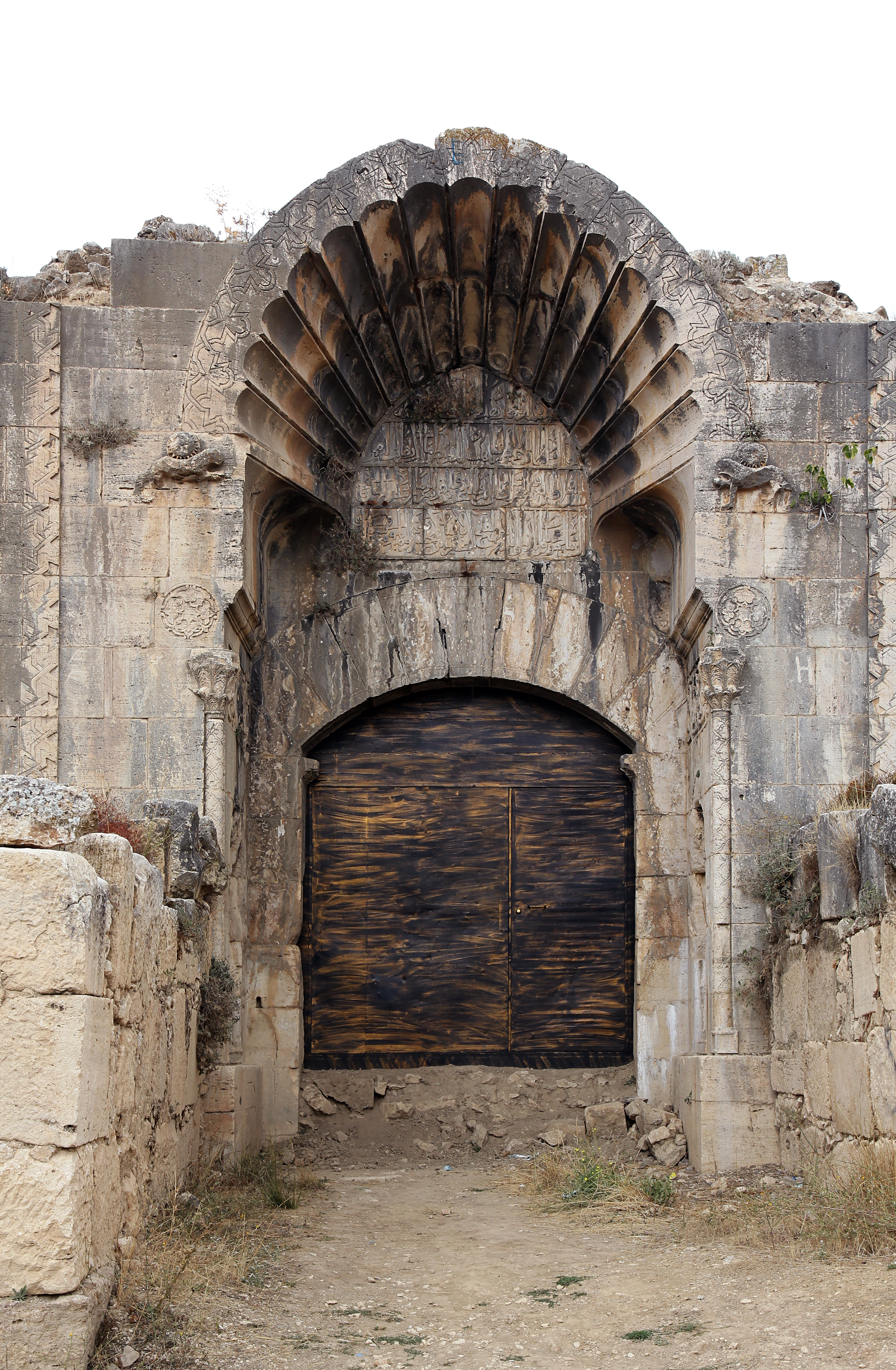 İncir Han, seldschukische Karawanserei bei Bucak in der Südwesttürkei, Portal